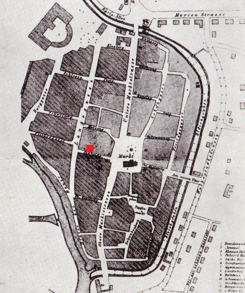 Stadtbrand 1874 in Meiningen - Karte mit zerstörten Vierteln und Entstehungsort des Brandes